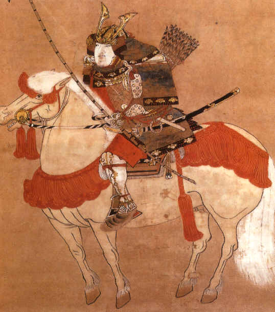 Lo shogun Ashikaga Takauji